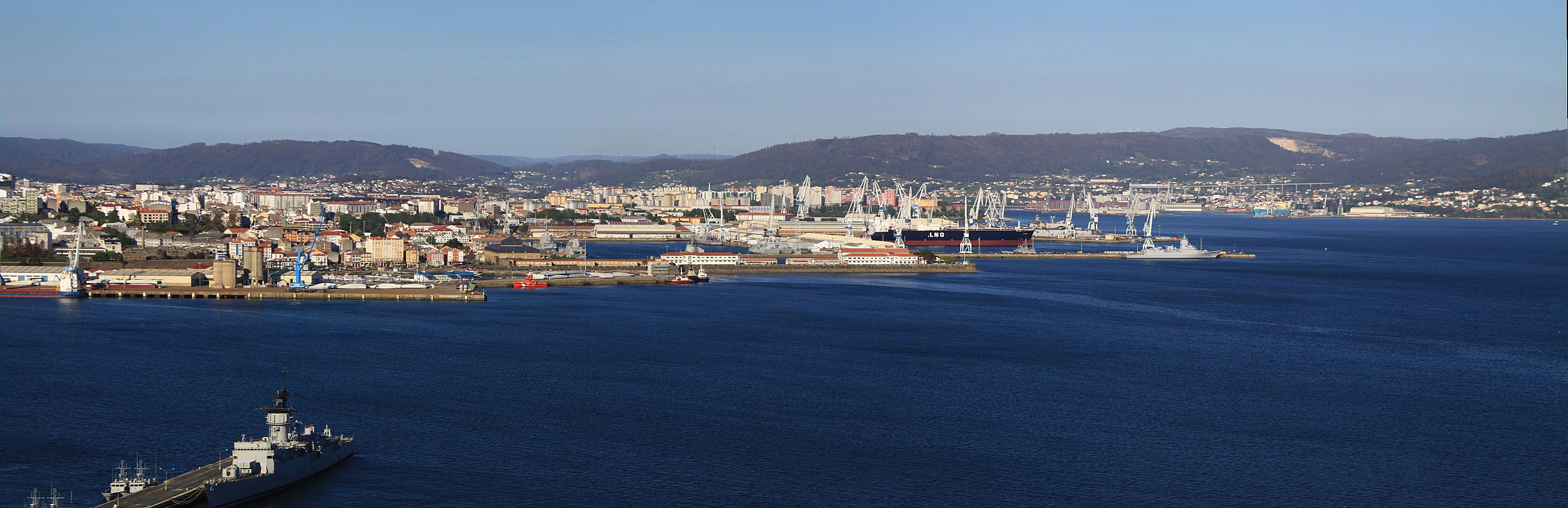 Porto de Ferrol